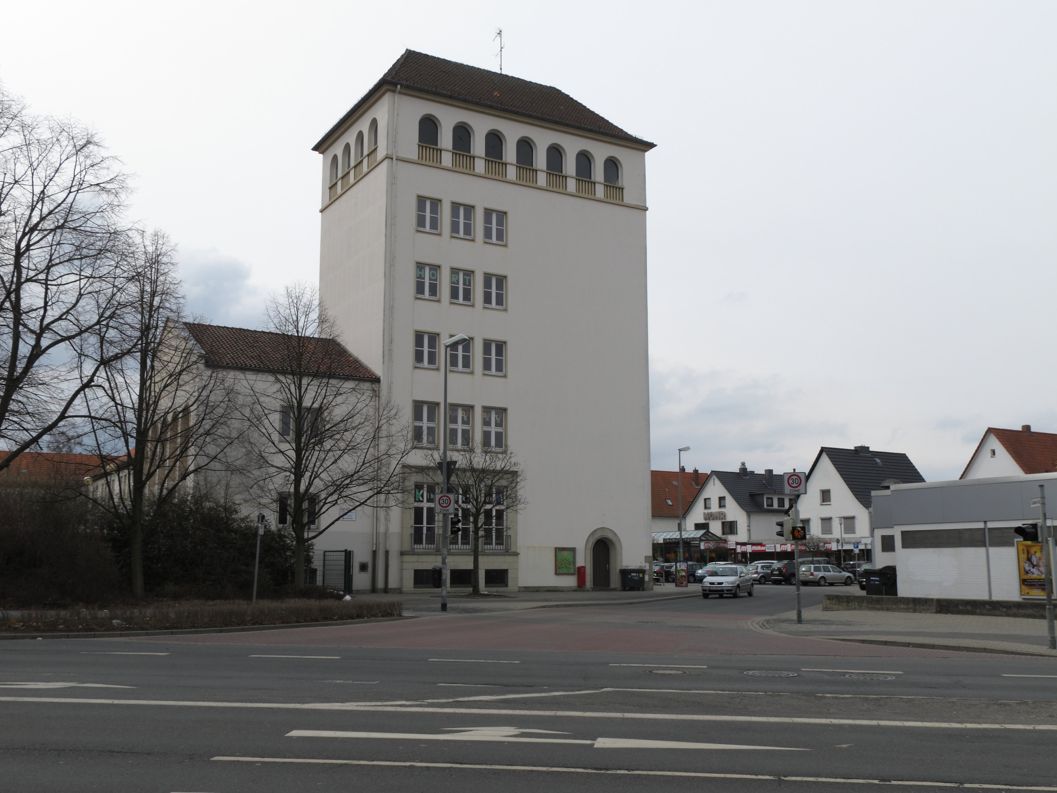 Braunschweig Lehndorf, Saarplatz mit Aufbauhaus